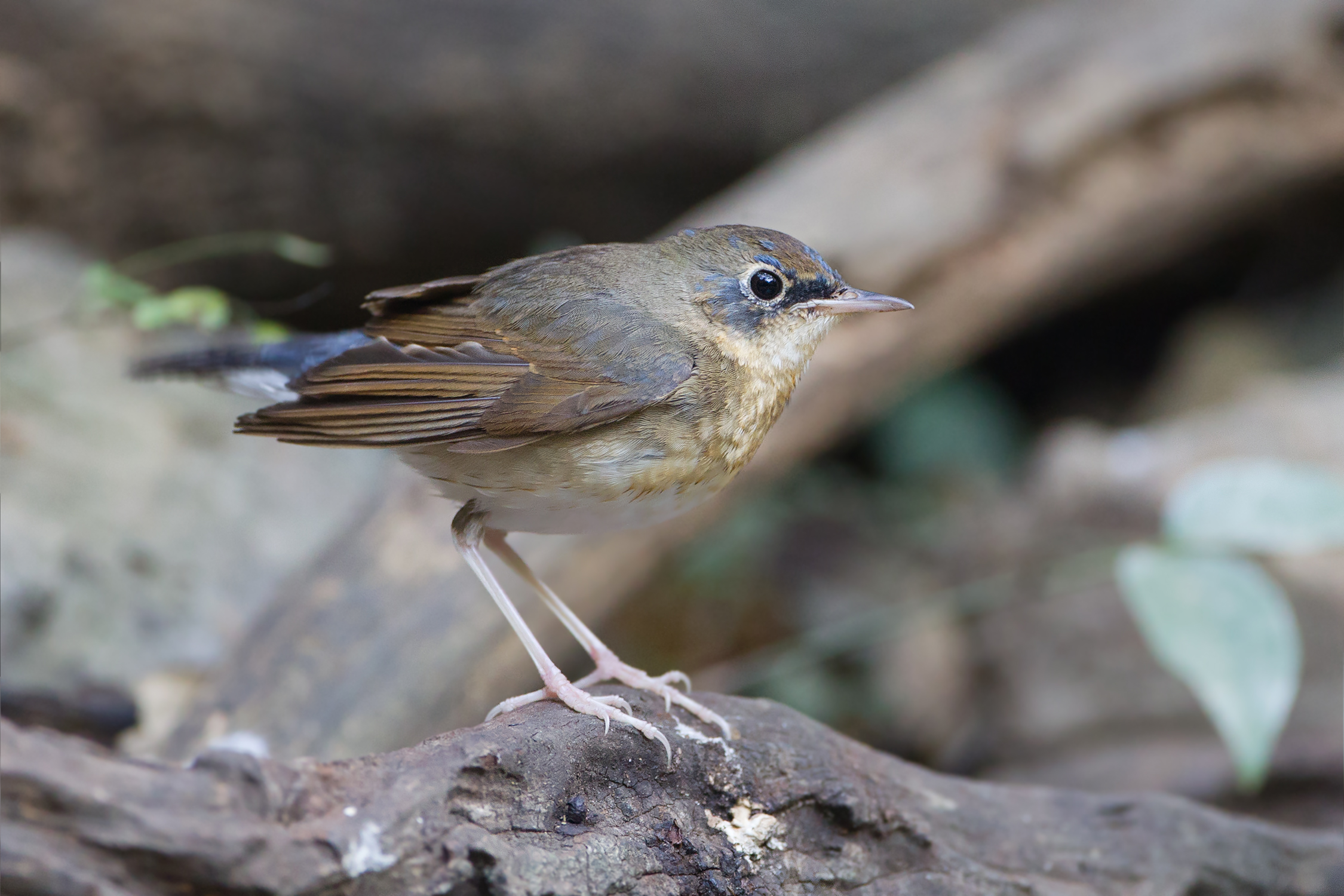 Juvenile Siberian Blue Robin (Luscinia cyane), Kaeng Krachan, Petchaburi, Thailand